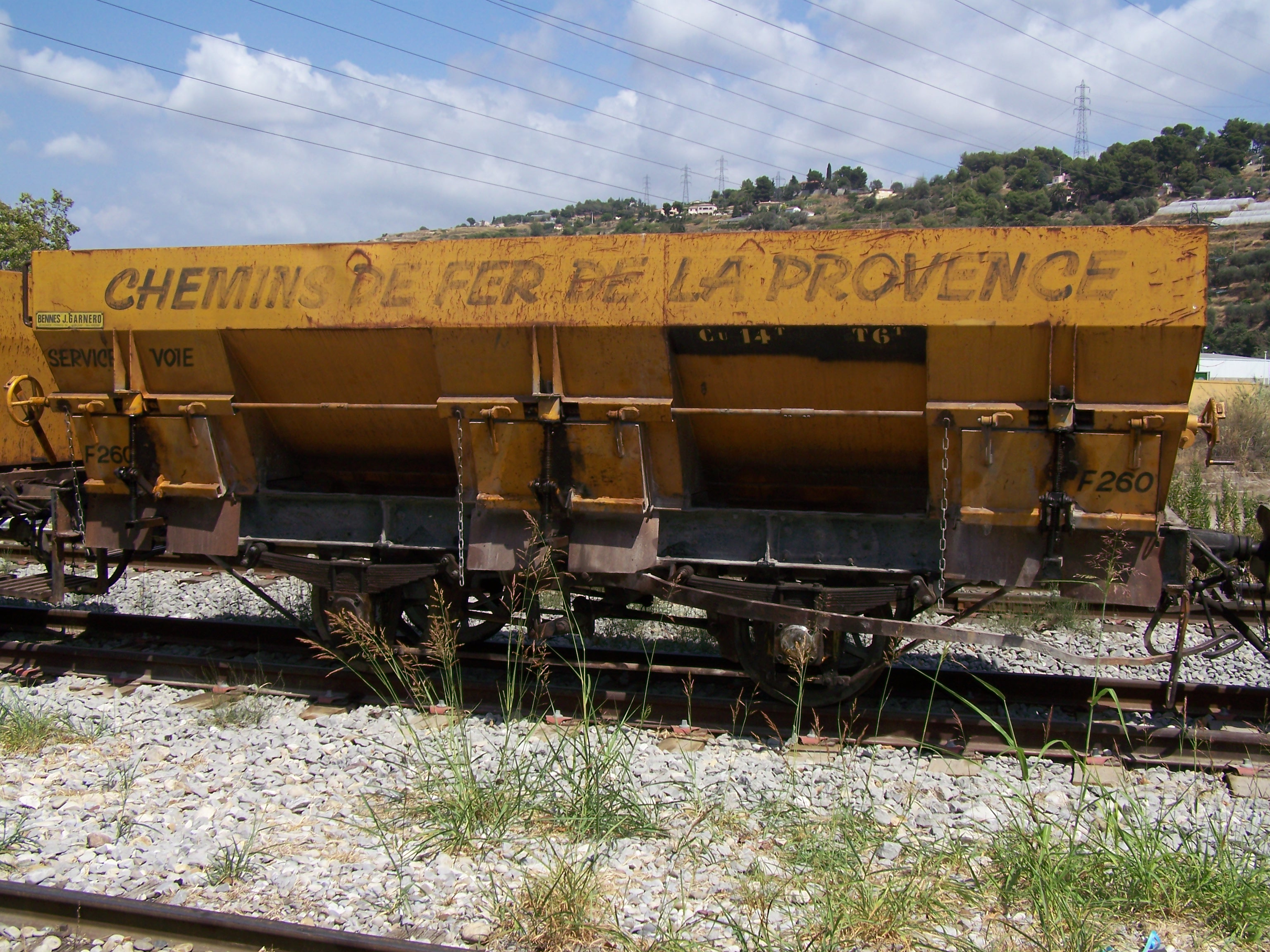 Wagon-ballast de service de voies des Chemins de fer de Provence en gare de Nice-Lingostière (Alpes-Maritimes, France).